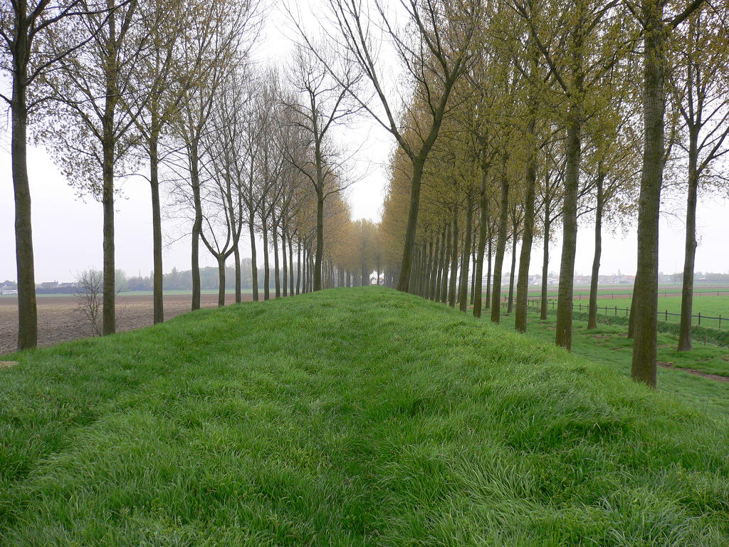 Foto van de Koningsdijk te Sint-Gillis-Waas, richting Kieldrecht